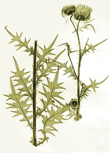 nature print of Cirsium lanceolatum